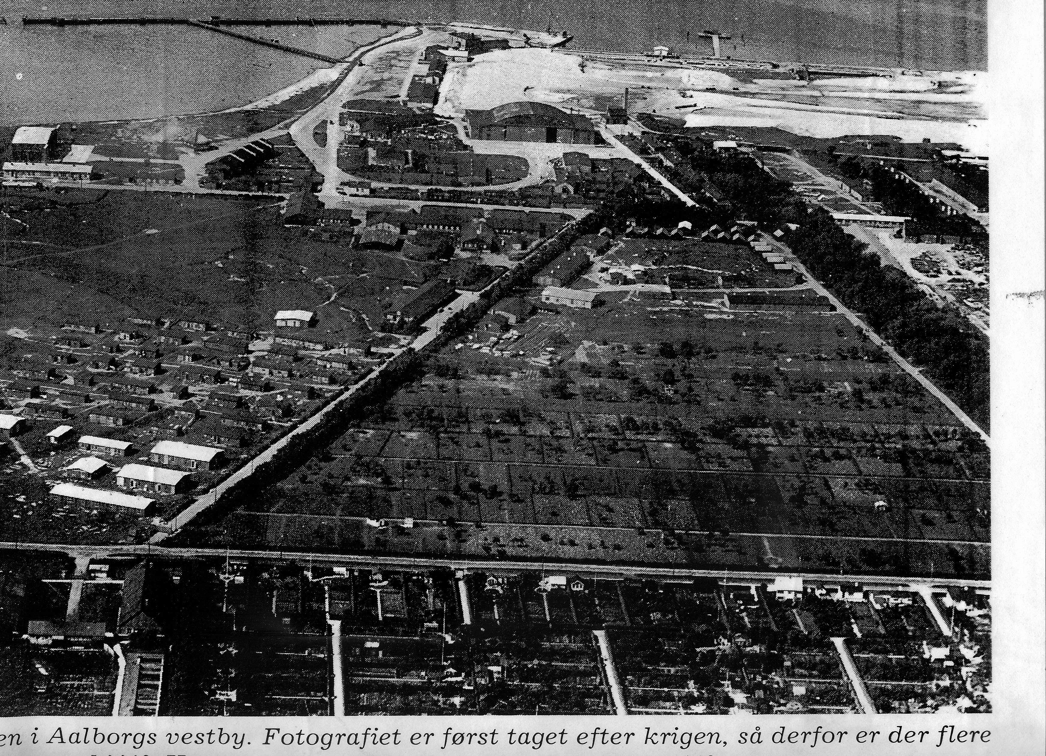 Flyfoto af Seefliegerhorst Aalborg taget lige efter krigens afslutning